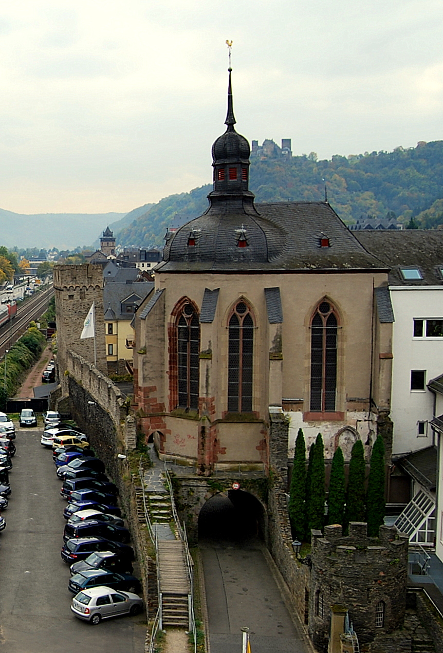 Oberwesel Wernerkapel